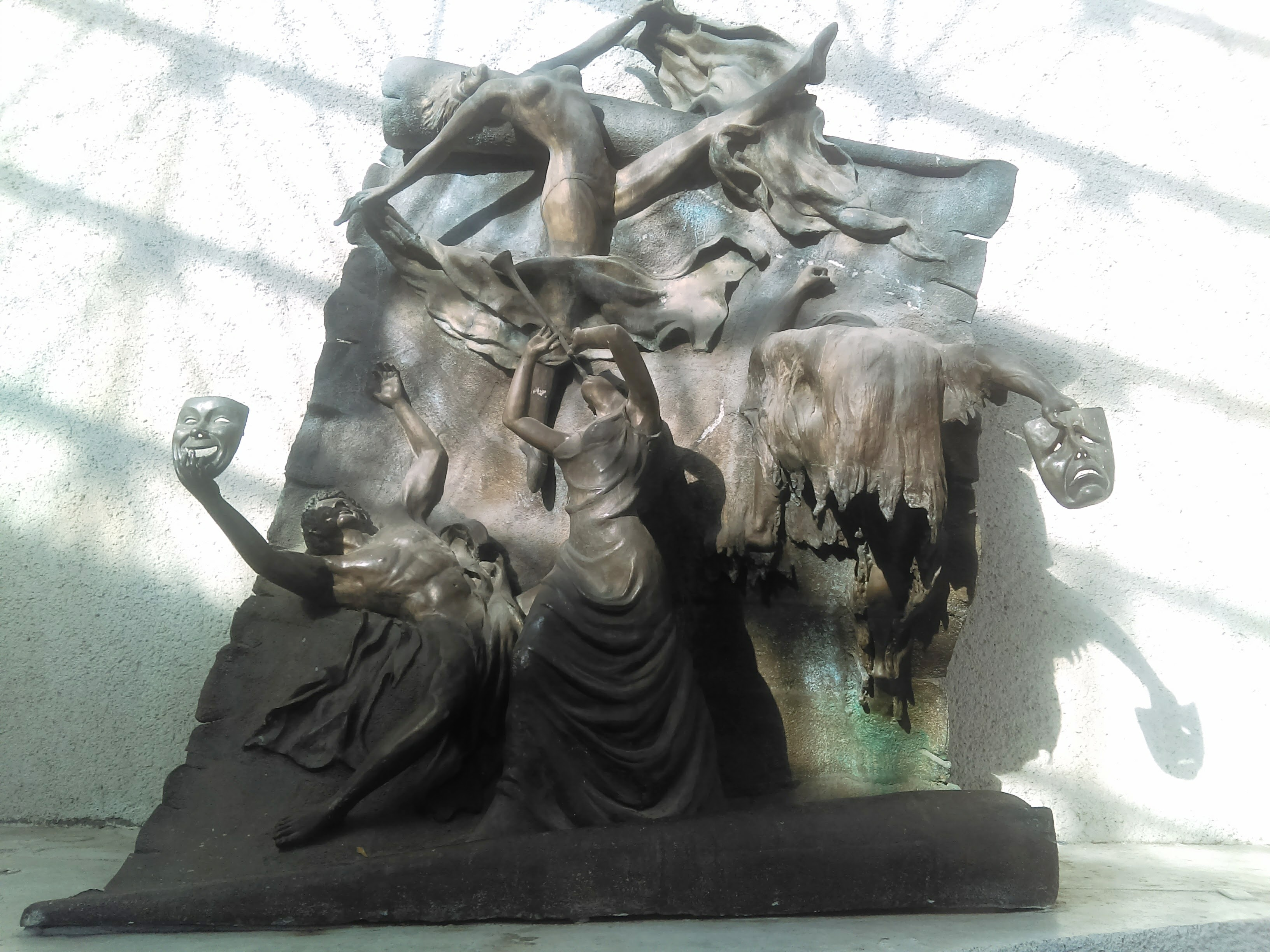 Teatro de San Francisco en Pachuca, México.